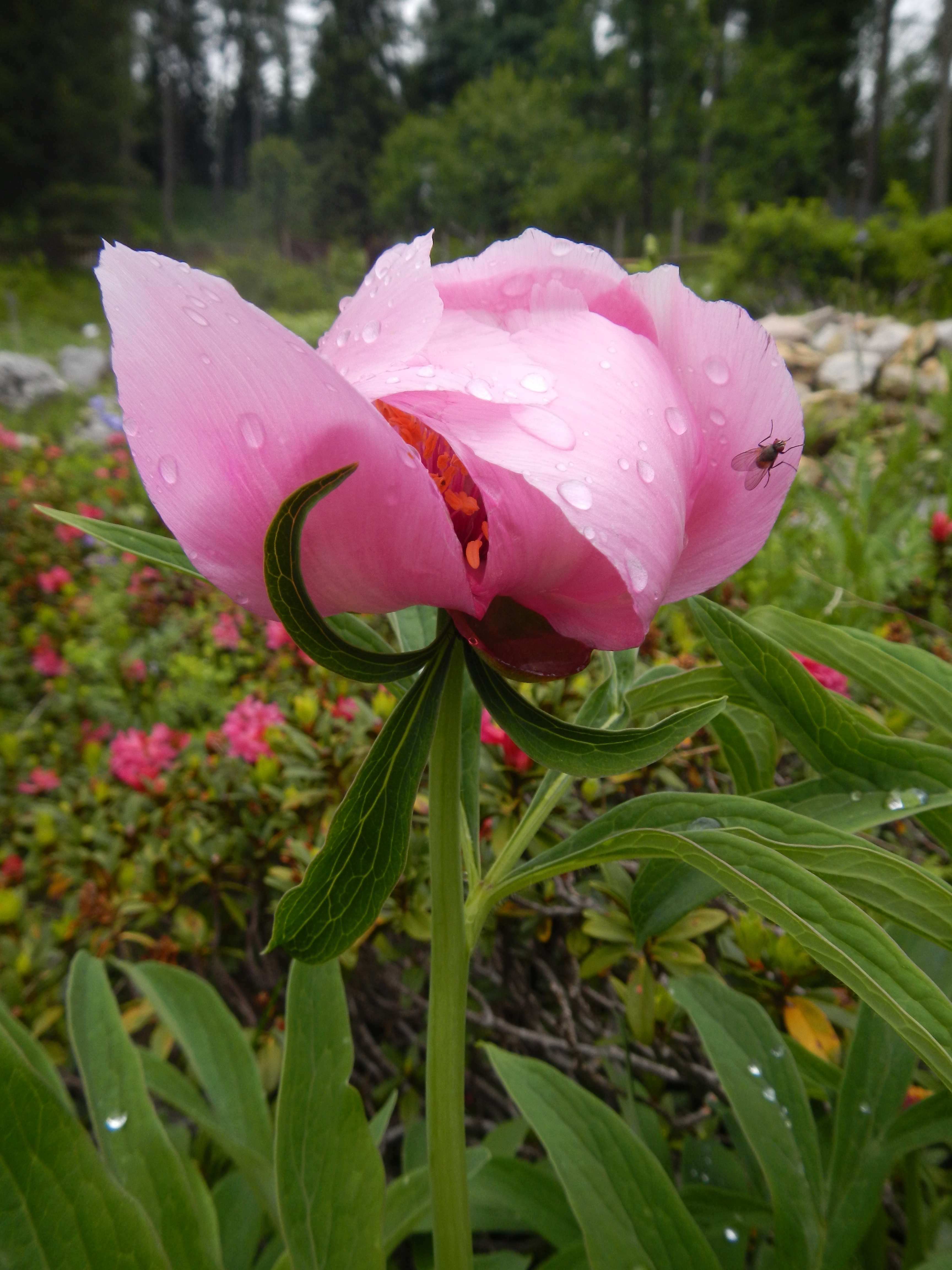 Paeonia officinalis, Giardino Botanico Alpino Viote